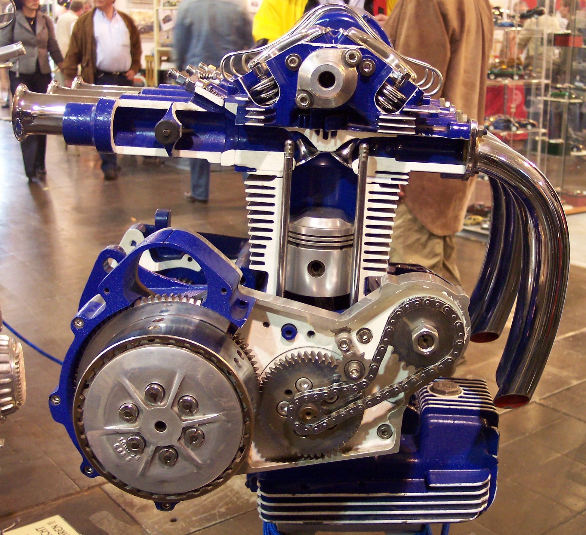 Münch (=NSU) Engine cutout